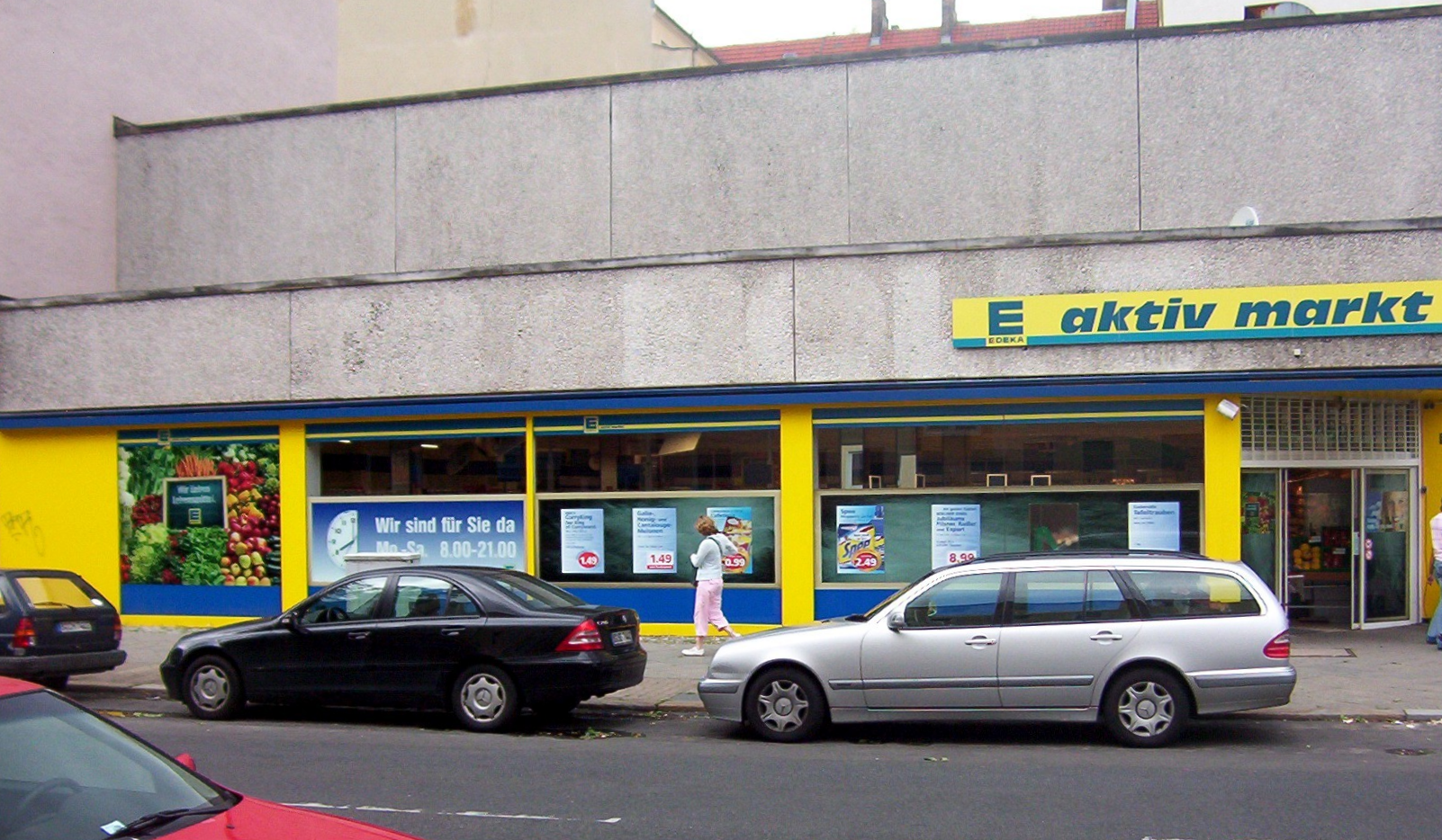 Diese ehemalige Bolle-Filiale in Berlin (Osnabrücker/Tauroggener Straße) wird im Film Lola rennt von Manni und Lola ausgeraubt